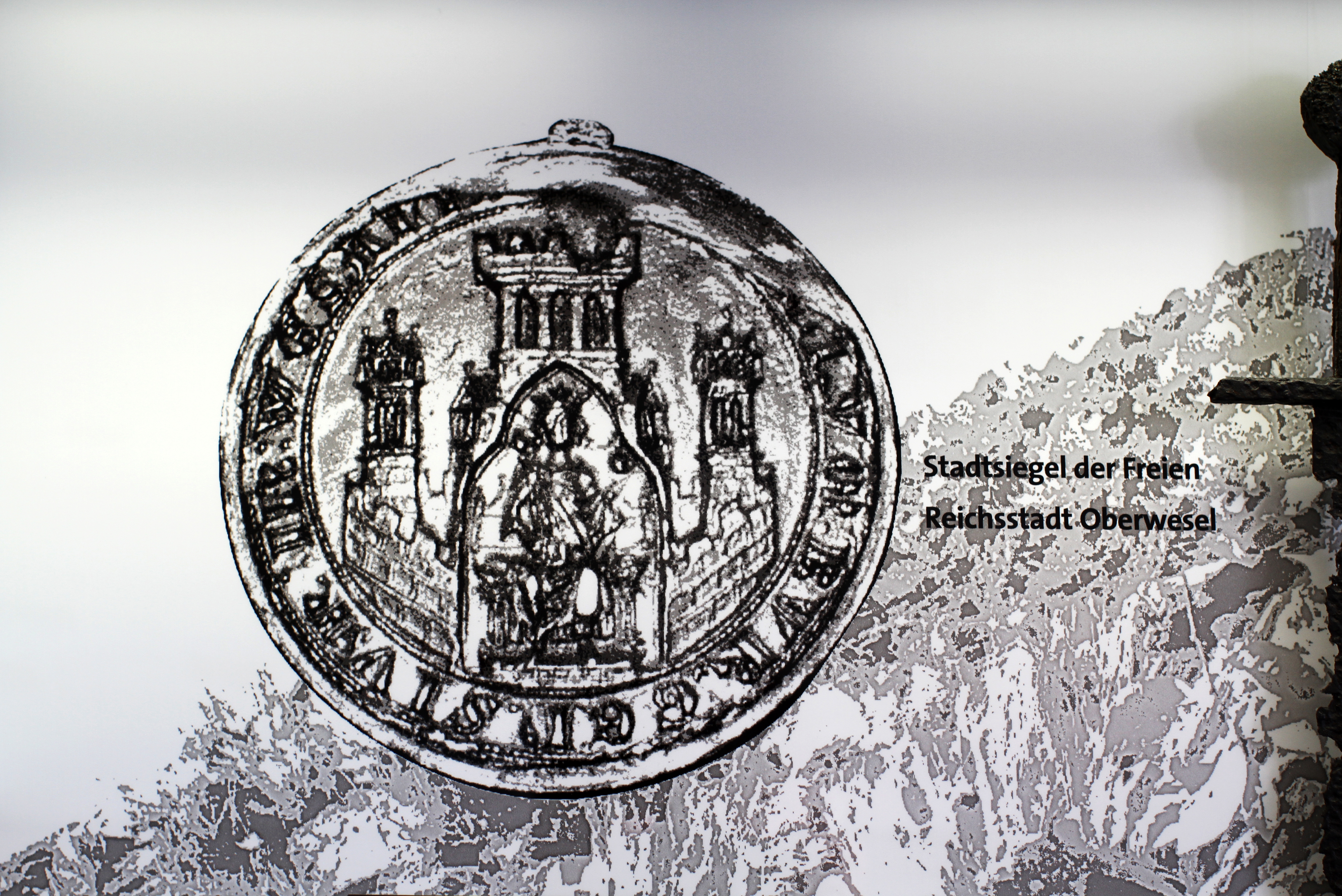 Stadtmuseum Oberwesel. Abbildung des reichsstädtischen Siegels als Wanddekoration eines Ausstellungsraumes.